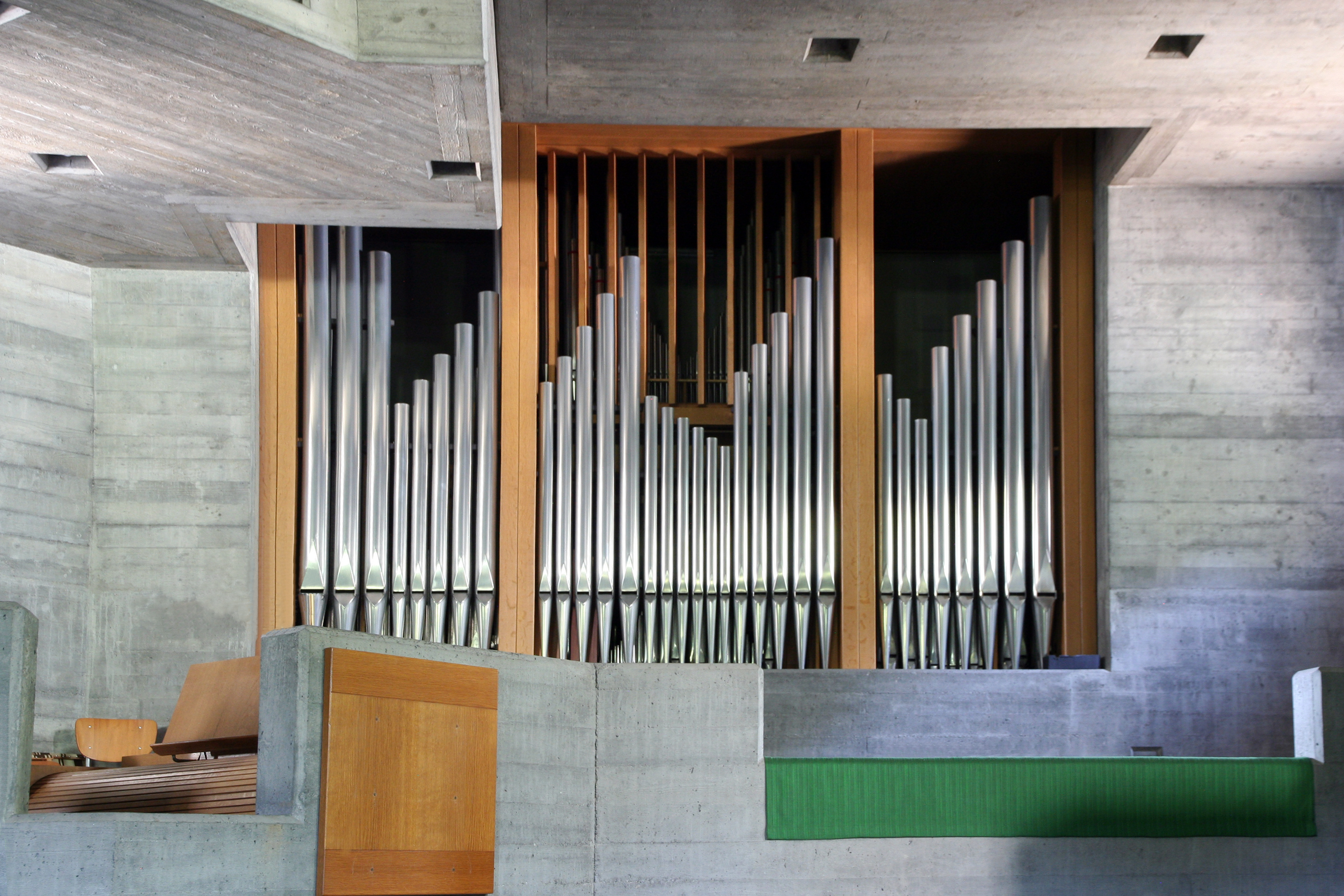 Römisch-katholische Pfarrkirche Heiligkreuz Bern